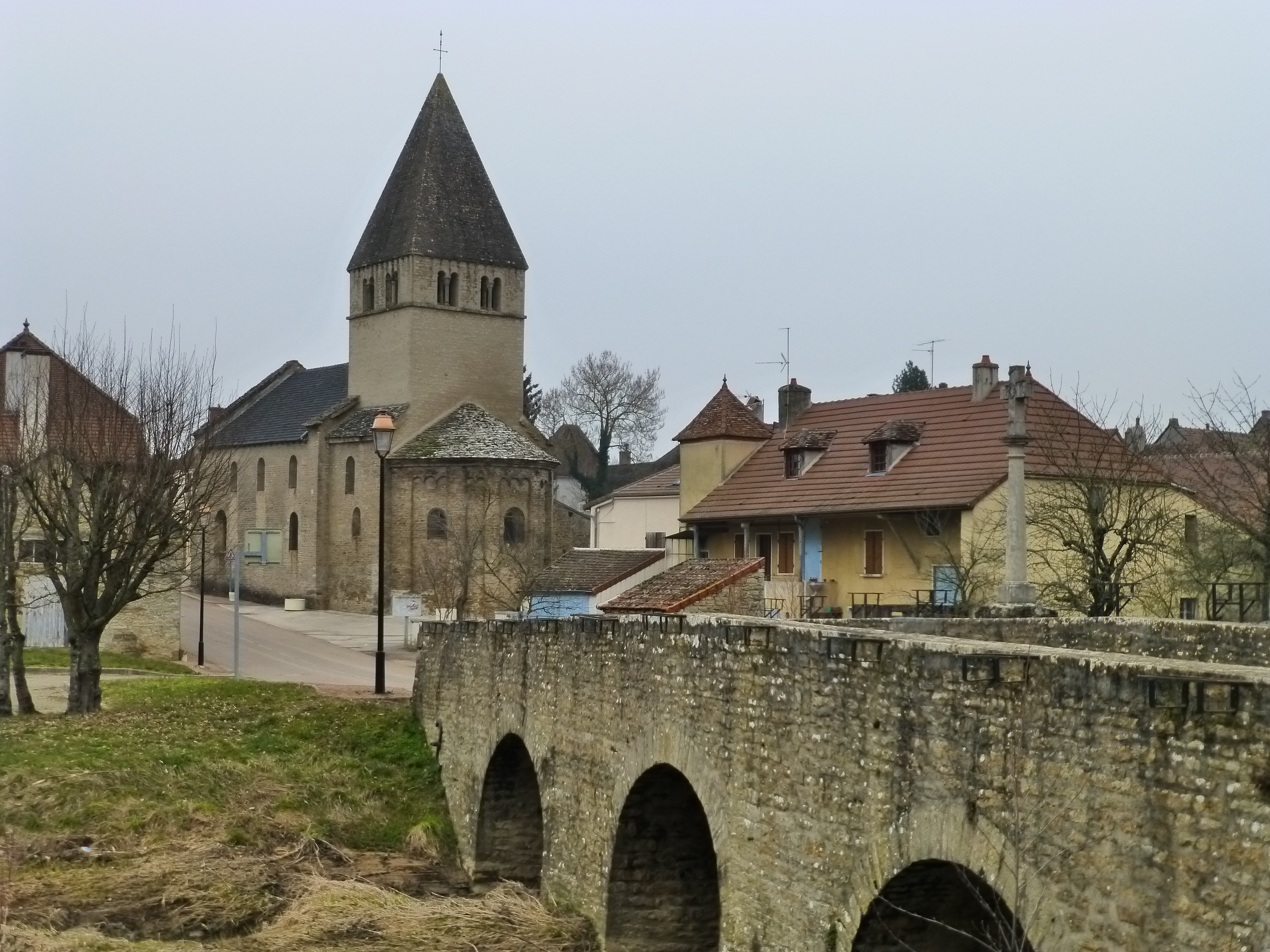 Genouilly : L'église, le Pont sur La Guye (Saône et Loire - France)